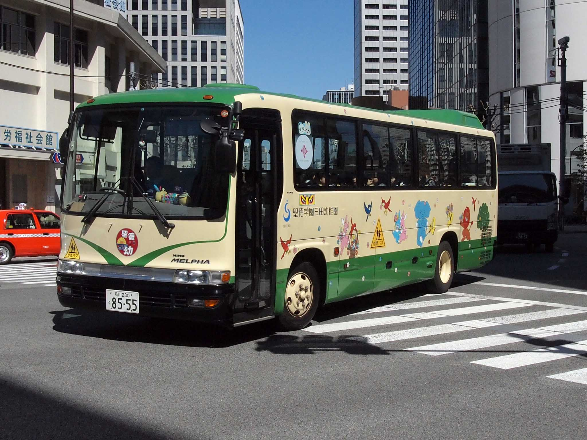 聖徳学園三田幼稚園のスクールバス。 型式：日野・メルファ KK-RR1JJEA 登録番号：品川230す8555 撮影地：東京都港区芝、田町駅付近